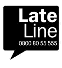 Logo der Radio- und Fernsehsendung Lateline